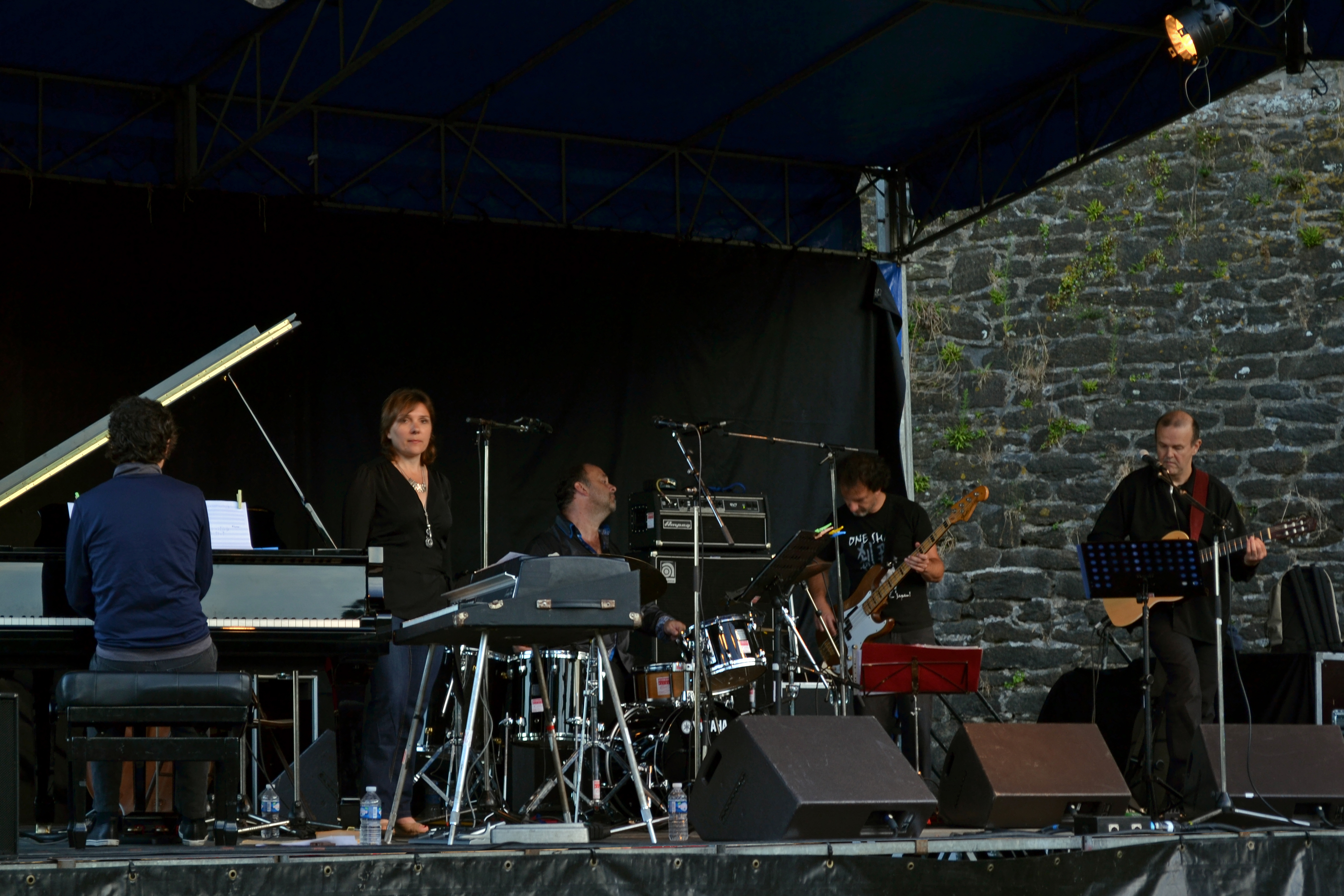 Les Jeudis du Port à Brest le 15 août 2013 : spectacle Ar Rannou (Les séries) par Jacques Pellen, Annie Ebrel et One Shot dans les douves du Château.